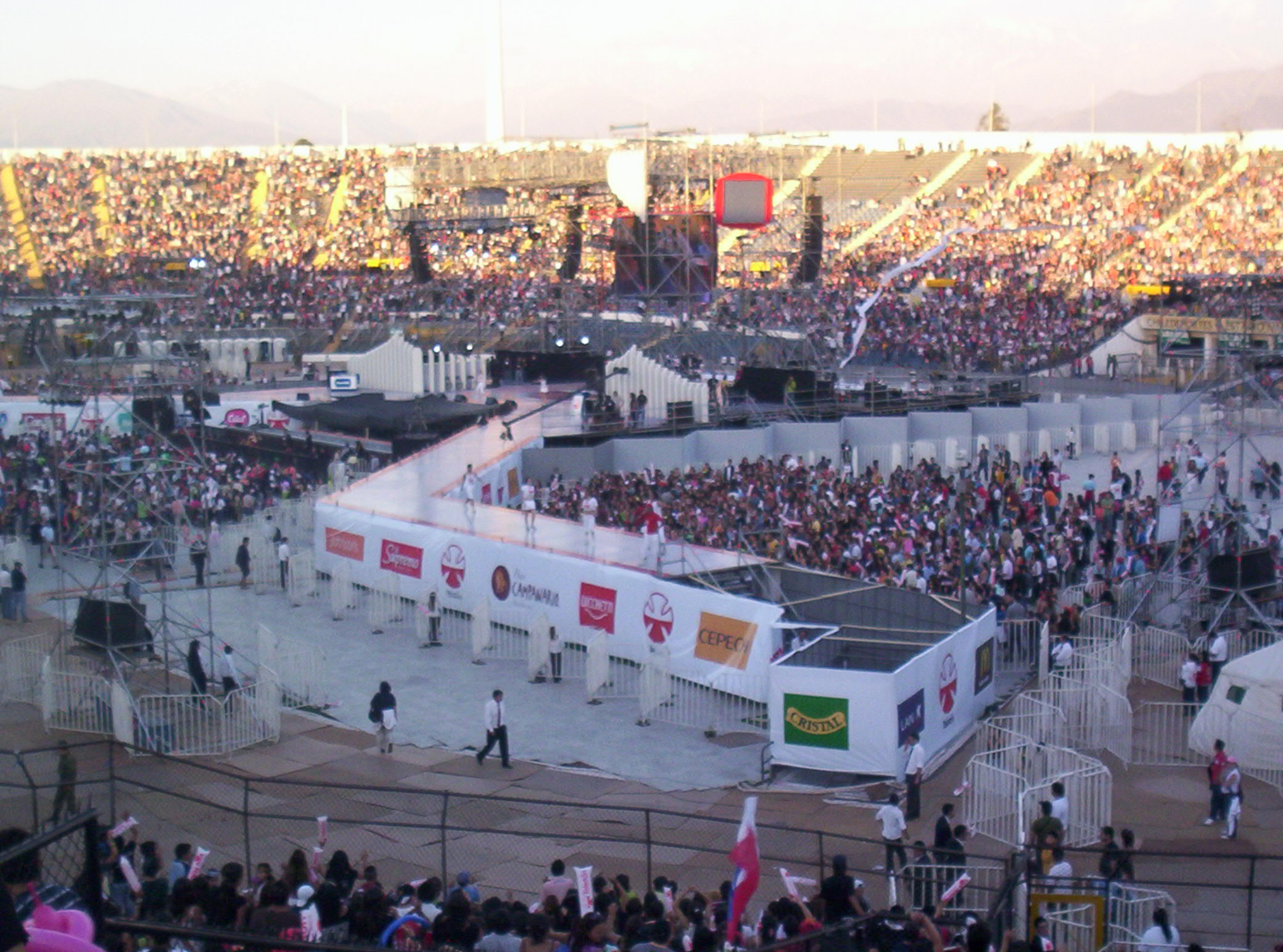 estadio nacional en teleton